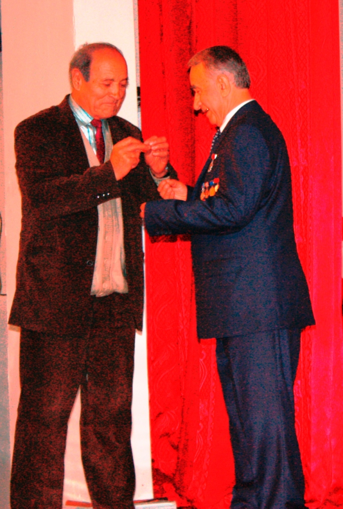 Награждение А. Холикназарова в Таджикском национальном университете